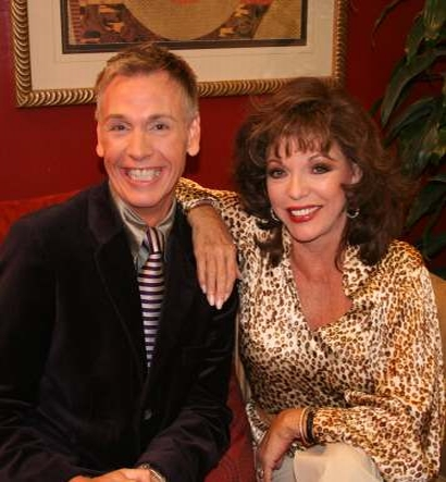 Joan Collins mit Leonard Simpson am 11. Januar 2007.